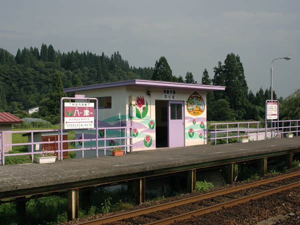 Yatsu Station, on the Akita Nairiku Jūkan Railway Akita Nairiku Line, Semboku, Akita, Japan